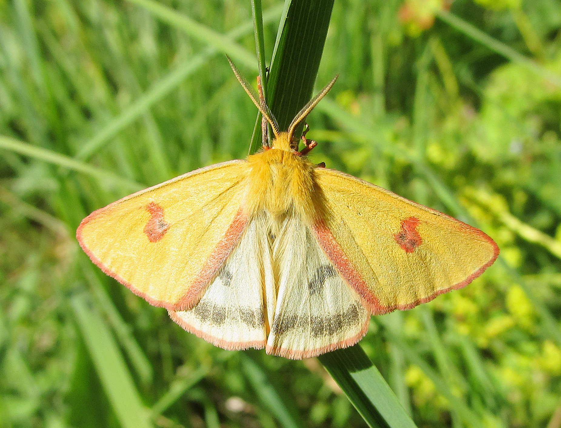 Diacrisia sannio Медведица луговая или медведица-скоморох под Санкт Петербургом. Самец расправил крылья.